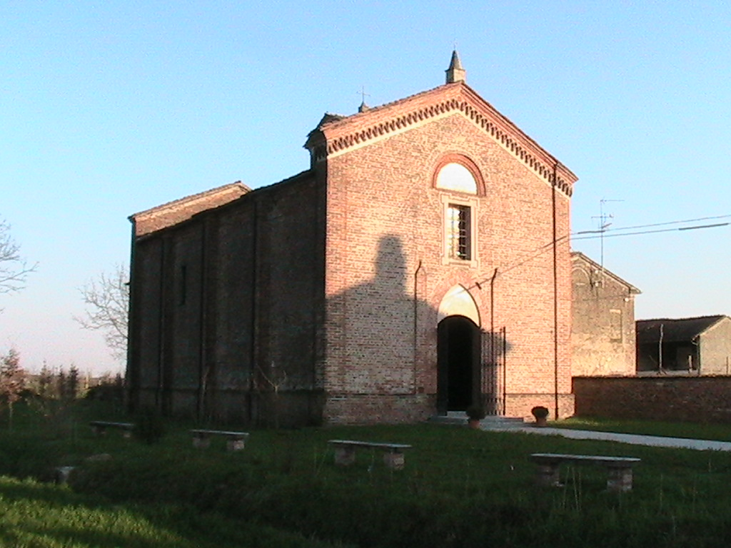 Santuario di Caruberto (San Martino del Lago)